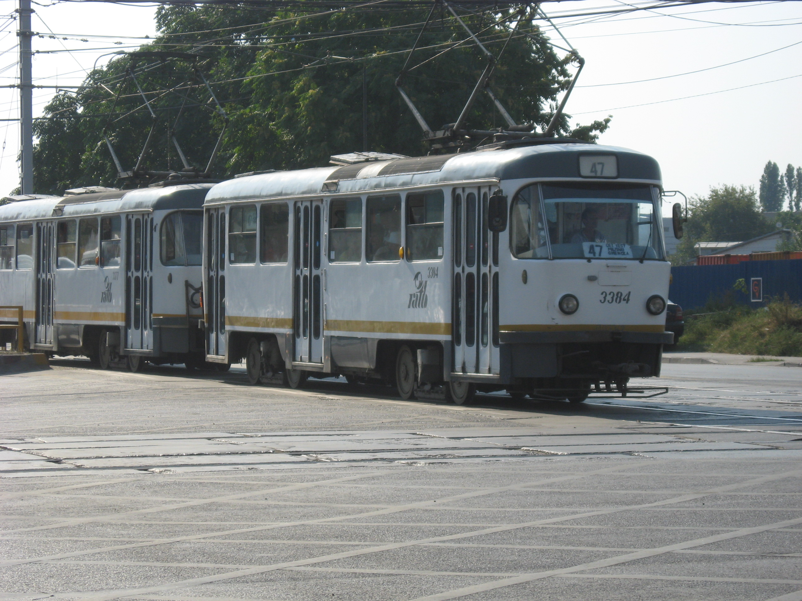 Tramvai RATB Tatra T4R #3384